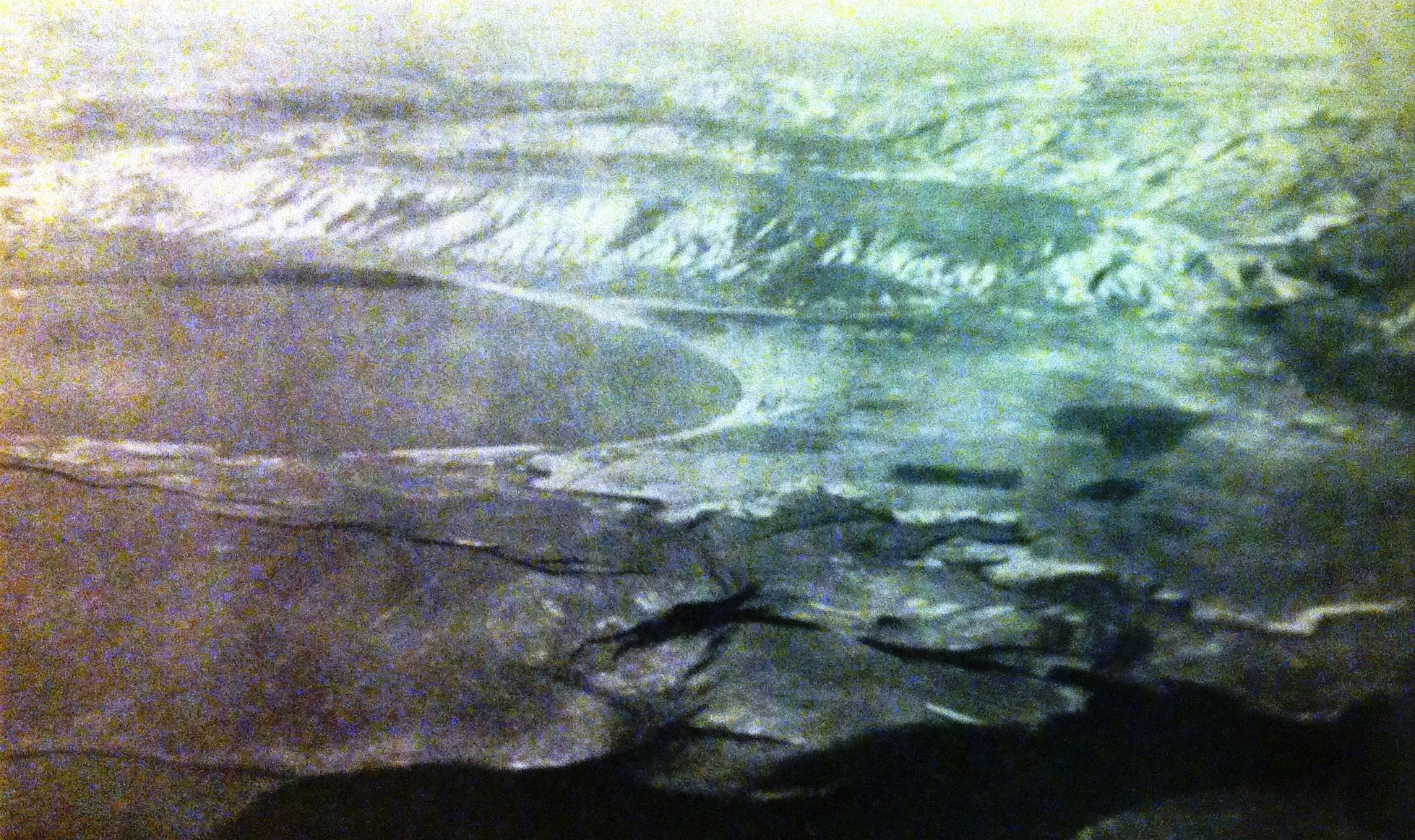 עמק הירדן בשנת 1915- האזור לא מיושב